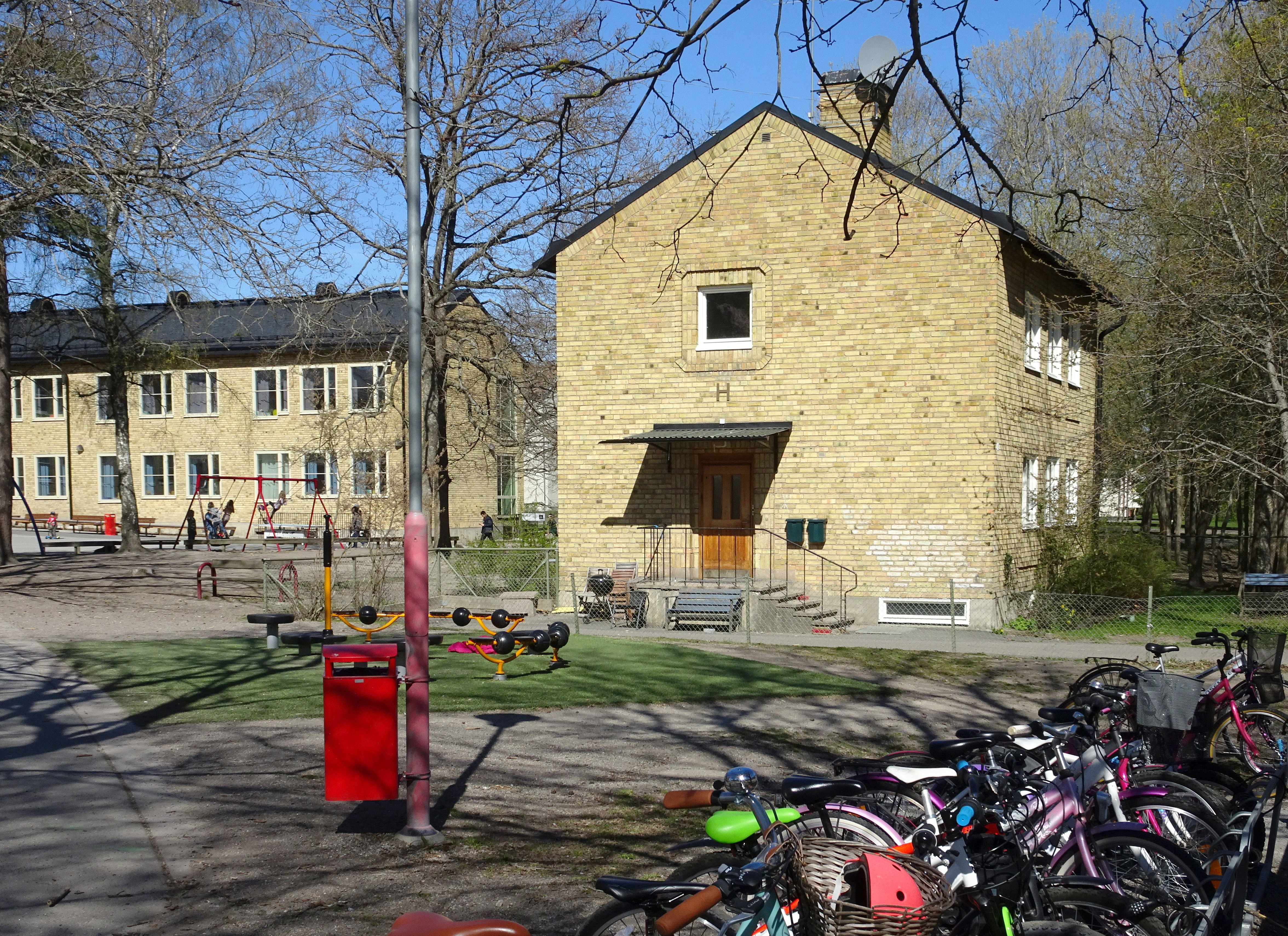 Hökarängsskolan